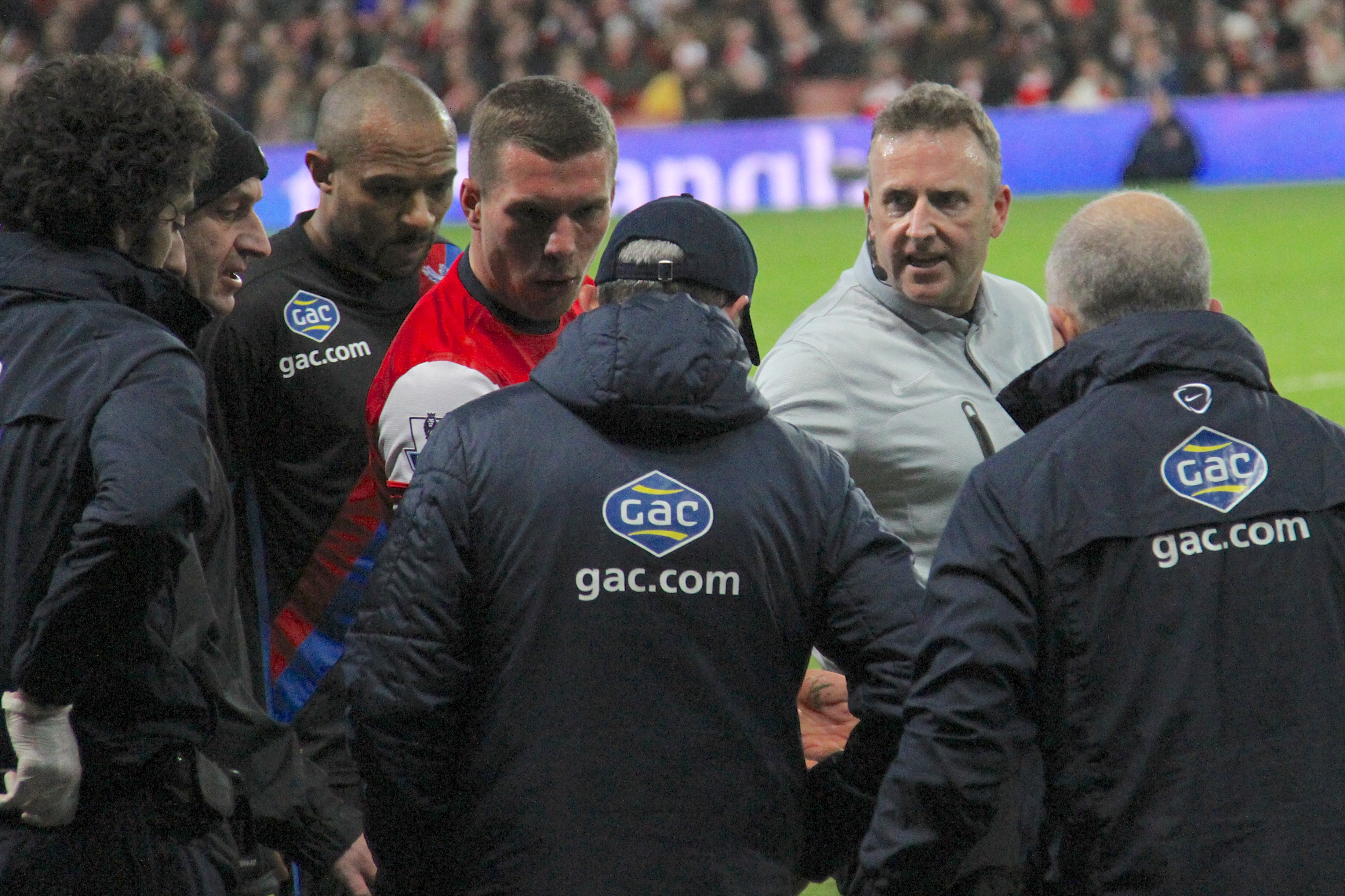 Lukas Podolski has words with Tony Pulis